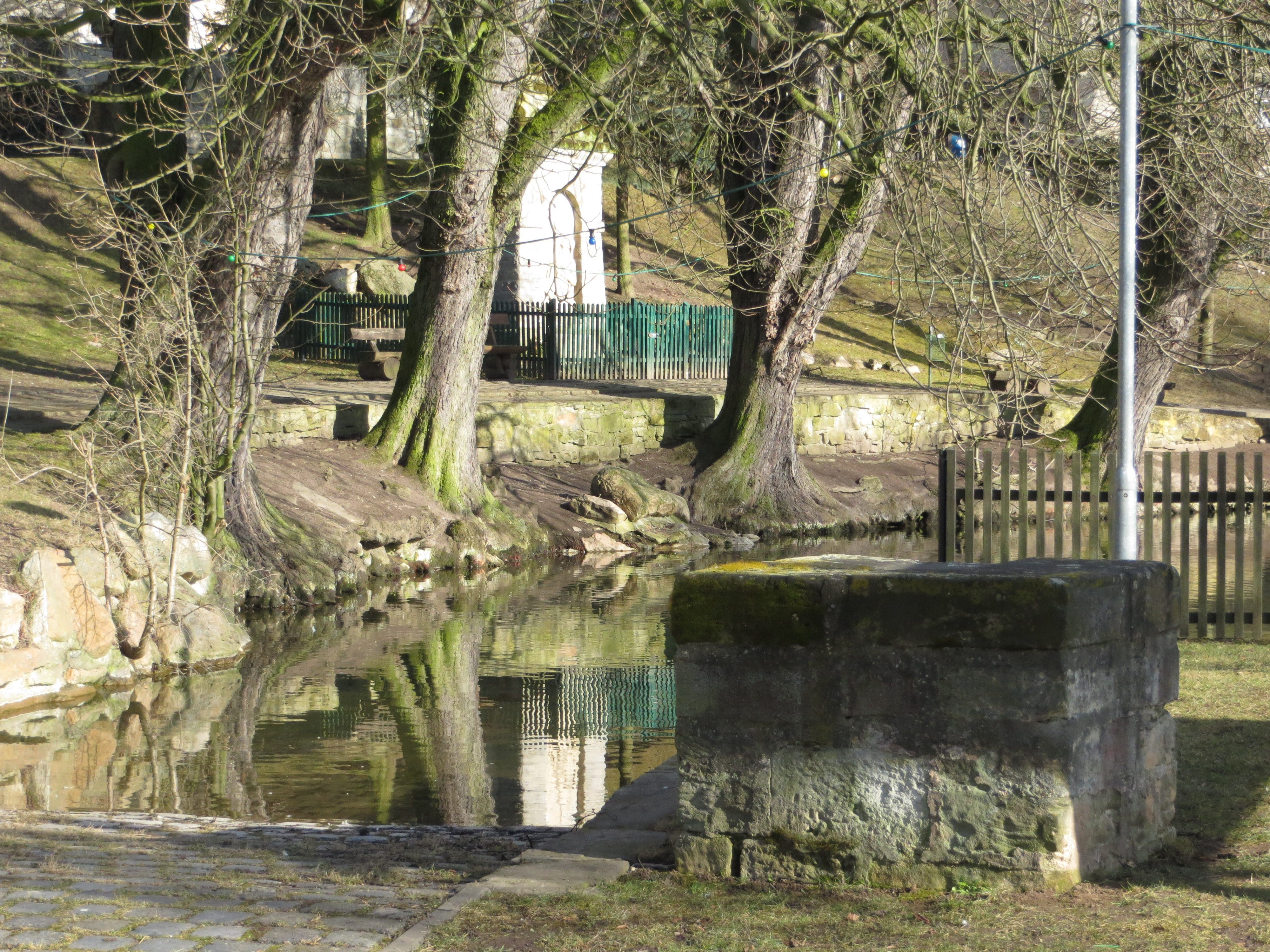 Einzingen – Bauernstein, Nagelstein und KriegerdenkmalThis is a photograph of an architectural monument. 83579This is a photograph of an architectural monument. 83577